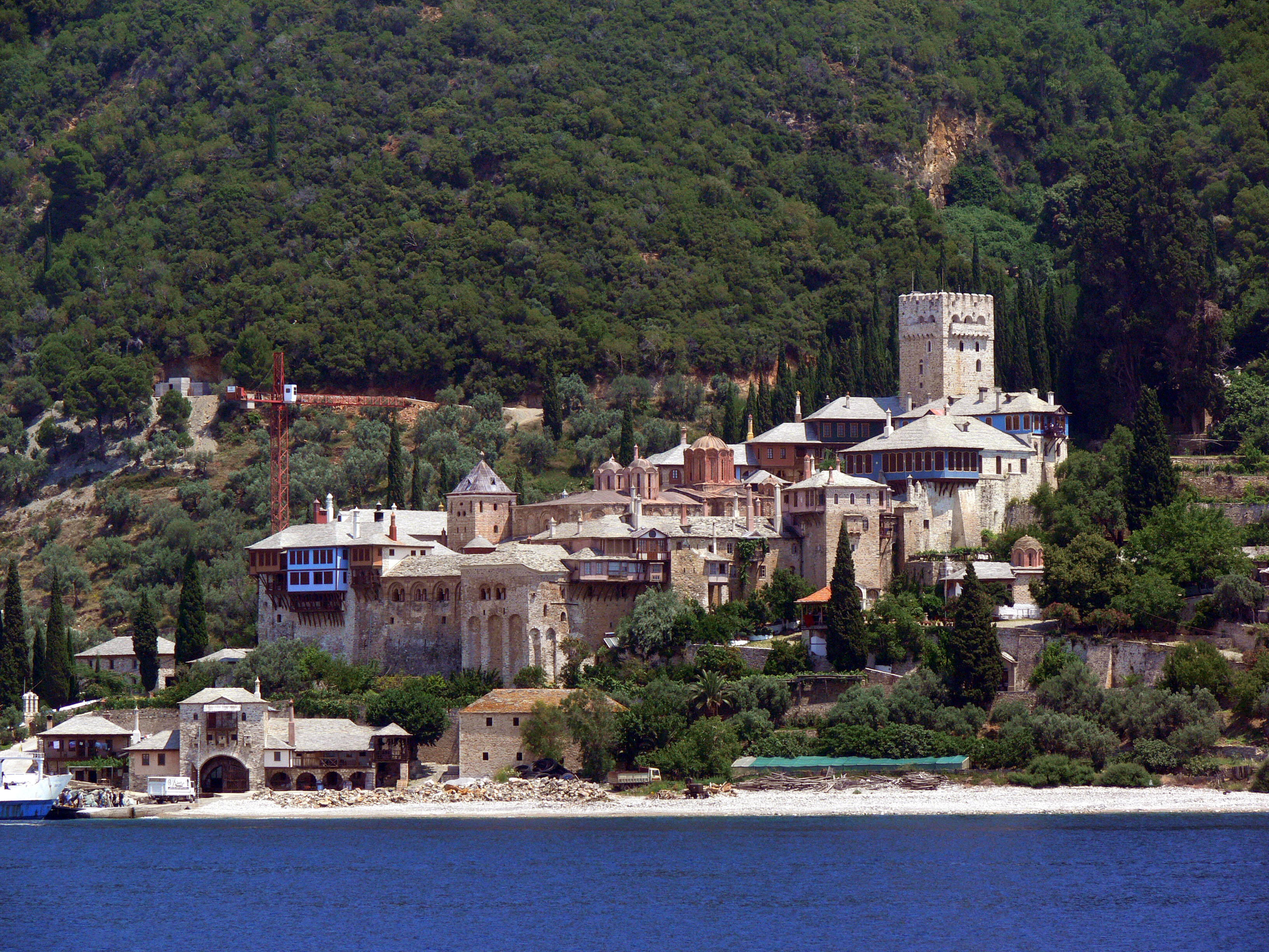 Kloster Dohiariou